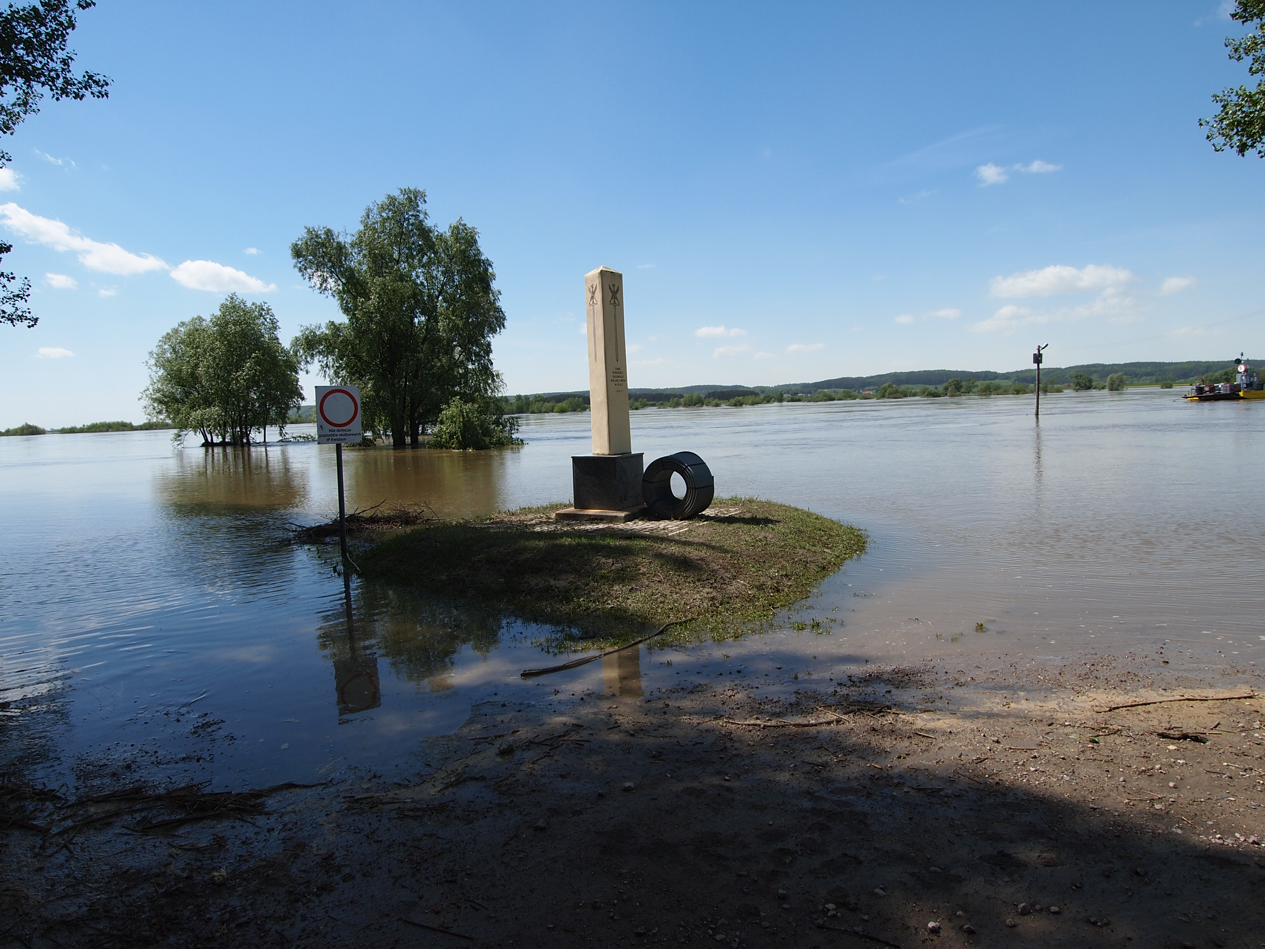 Korzeniewo, koło Kwidzyna - wylała Wisła. Obelisk wskazujący poziom wody w czasie najwyższych powodzi.